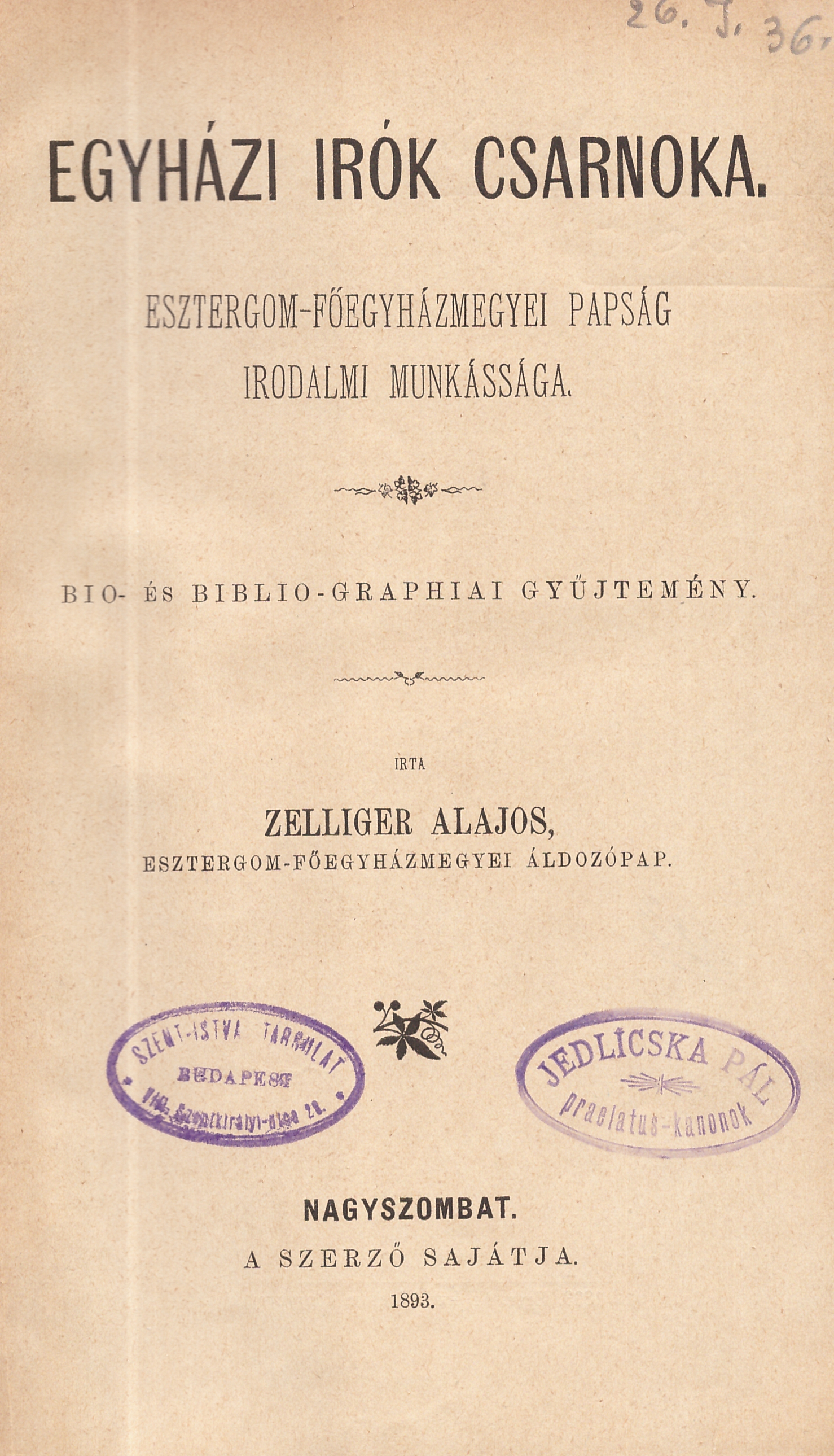 Zelliger Alajos (1863-1942): Egyházi írók csarnoka (1893) - címlap